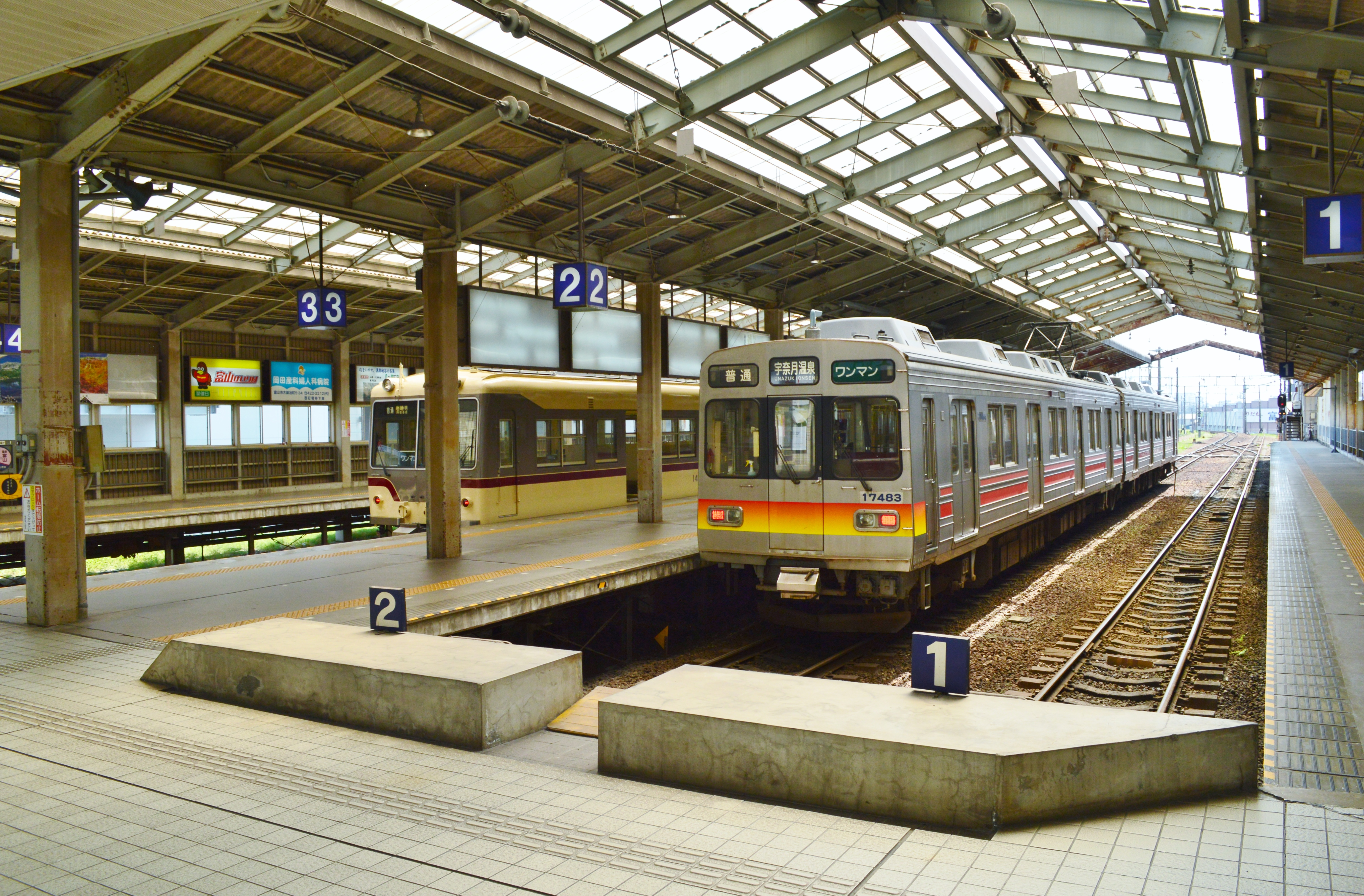 電鉄富山駅 ホーム